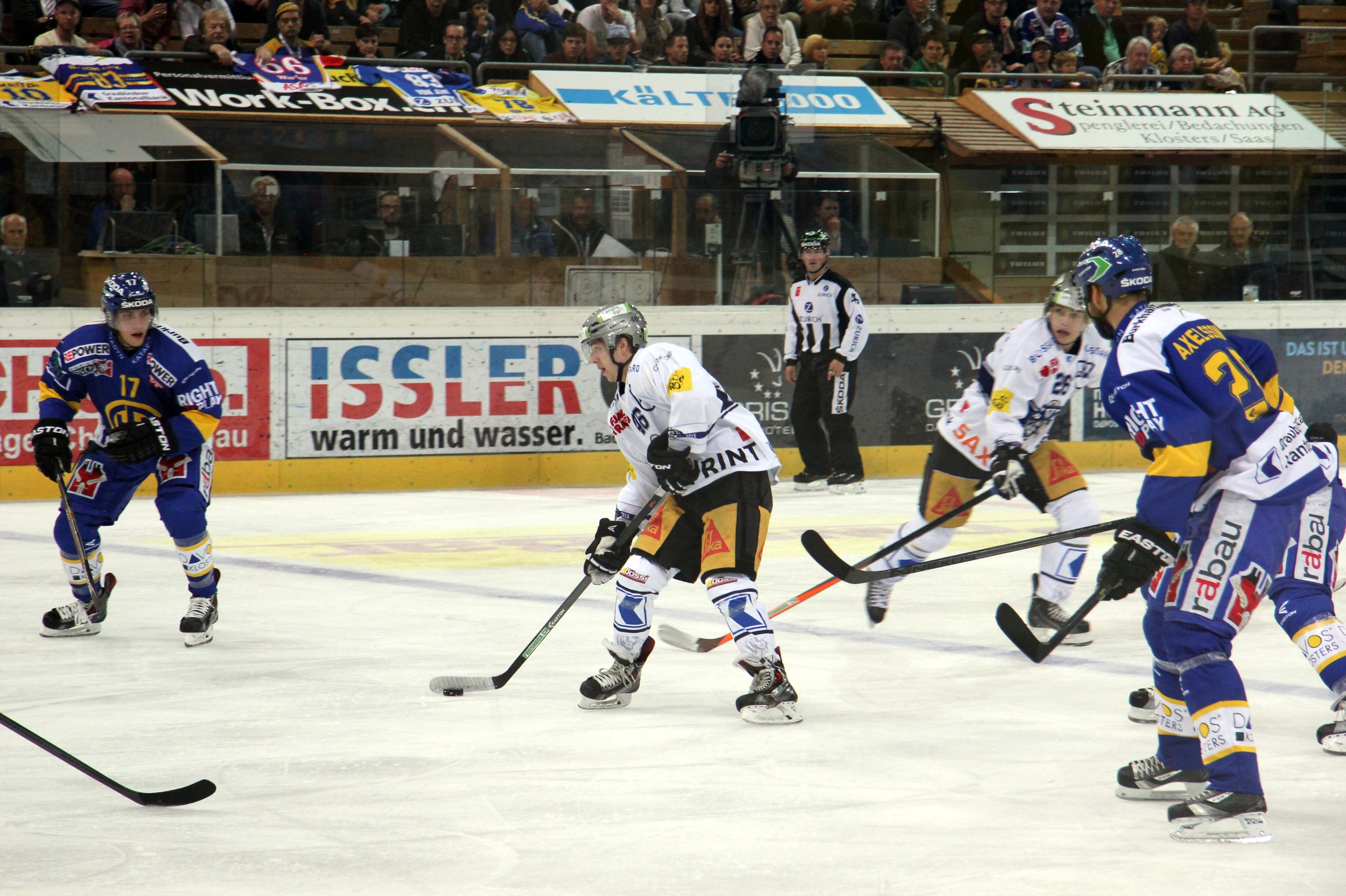 Perttu Lindgren (D 17), Lino Martschini (Z 46), Roman Kaderli (R 49), Reto Suri (Z 26), Dick Axelsson (D 28).